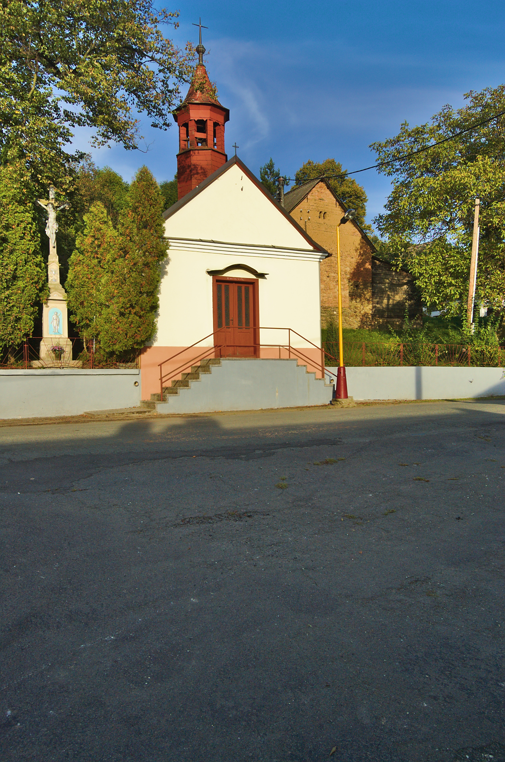 Kaple na návsi, Vysoká, okres Svitavy